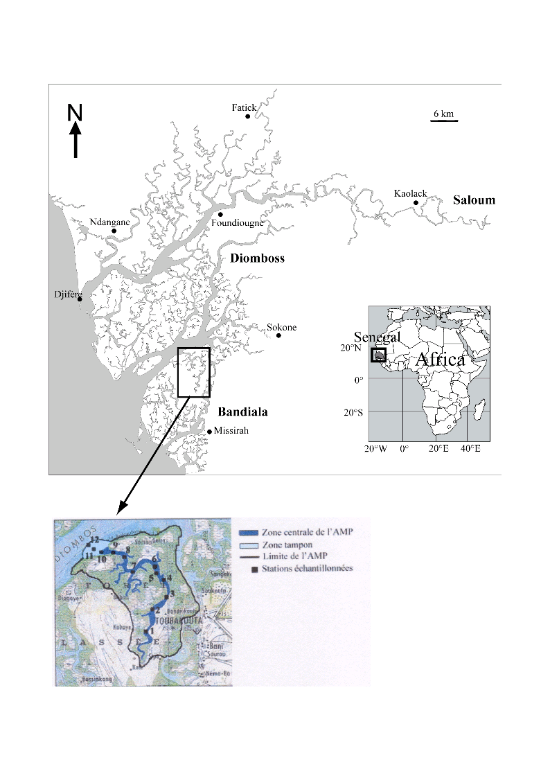 Il s'agit d'un assemblage de dessins et de scans représentant la localisation géographique de l'aire Marine Protégée du bolon de Bamboung. Le fond de carte du Saloum est un dessin original, l'insert de la carte d'Afrique provient de la galerie OpenOffice et la position des stations d'échantillonnage est un scan modifié d'un fond de carte IGN.